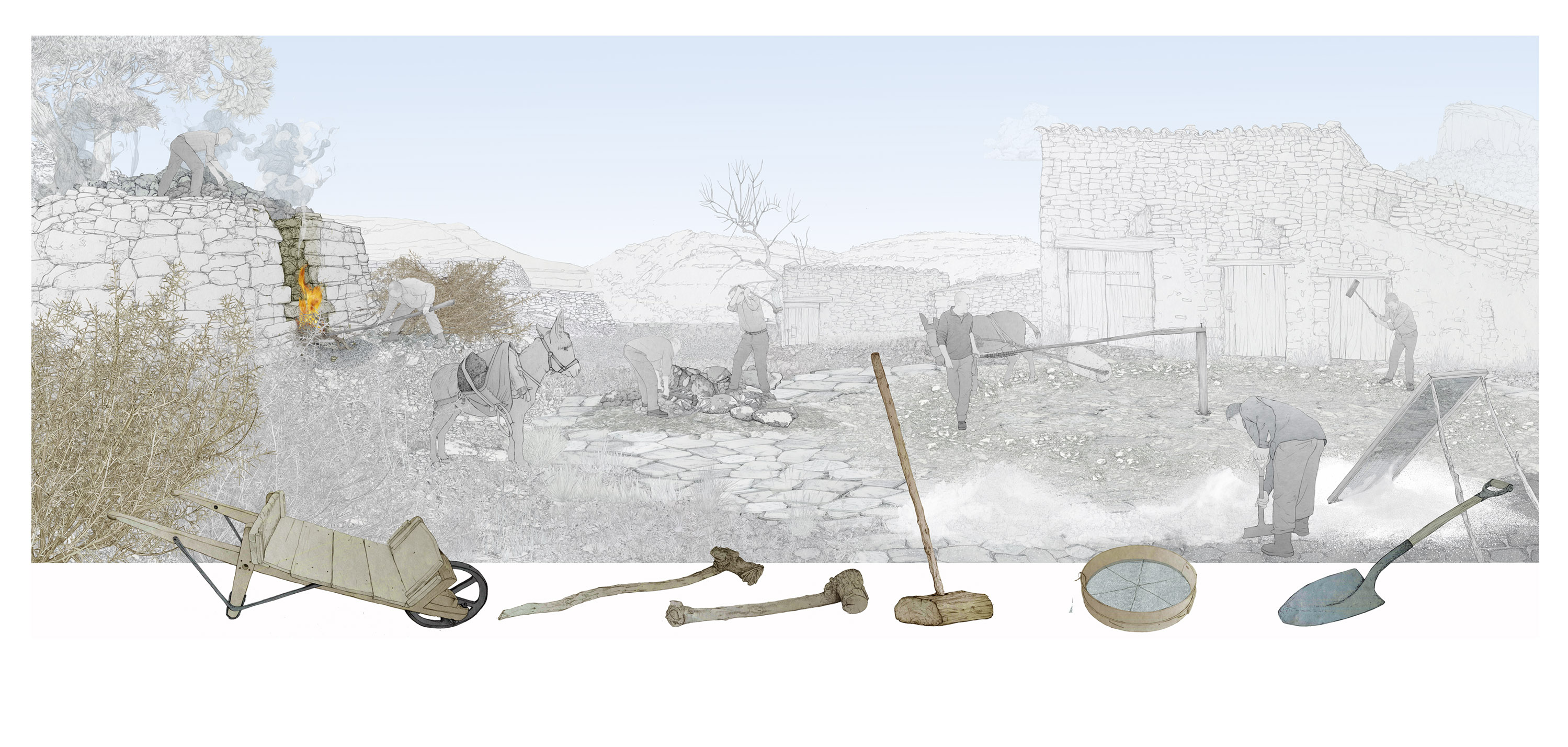 Il·lustracions d'Andrés Marín Jarque per a l'exposició permanent "Secà i Muntanya" del Museu Valencià d'Etnologia. S'il·lustren els escenaris del medi rural i el procés (treball) mitjançant el qual s'aprofita este espai.